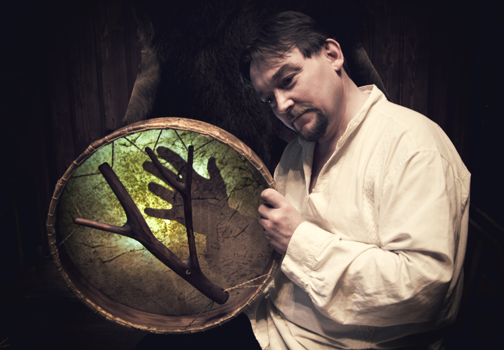 Paulinyi Tamás sámándobbal